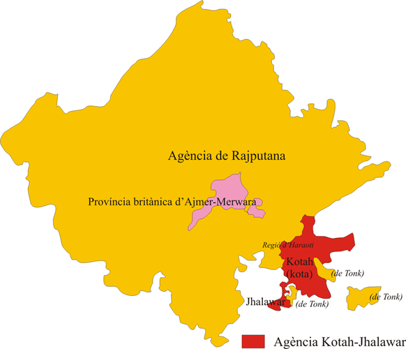 Agency Kotah-Jhalawar of Rajputana